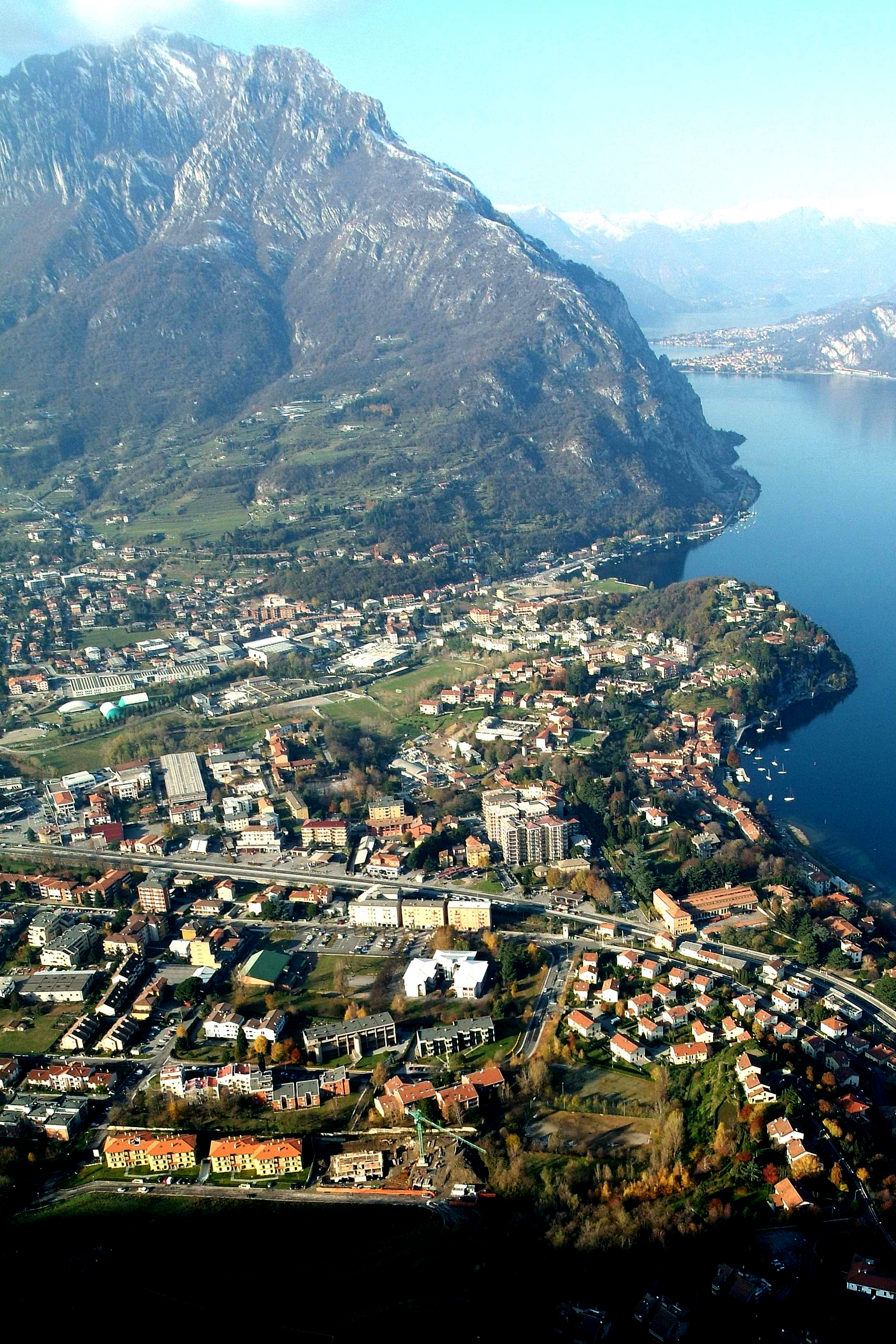 Malgrate vista dalla Croce di Pian Sciresa